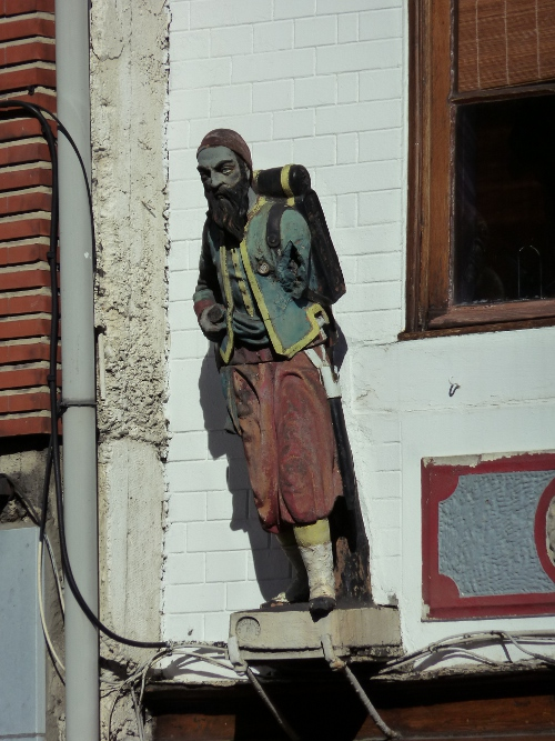 Lüttich-Outremeuse: In der Heimat von Georges Simenon